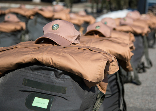 Международный противоминный центр Вооруженных Сил Российской Федерации. Сбор и построение перед отправкой в Сирию для выполнения задач по разминированию города Пальмира